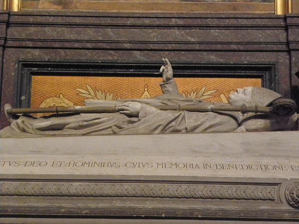 Tombeau de Mgr Gonindard en la Métropole Saint-Pierre de Rennes. Sculpteur: Jean-Marie Valentin et ses fils.